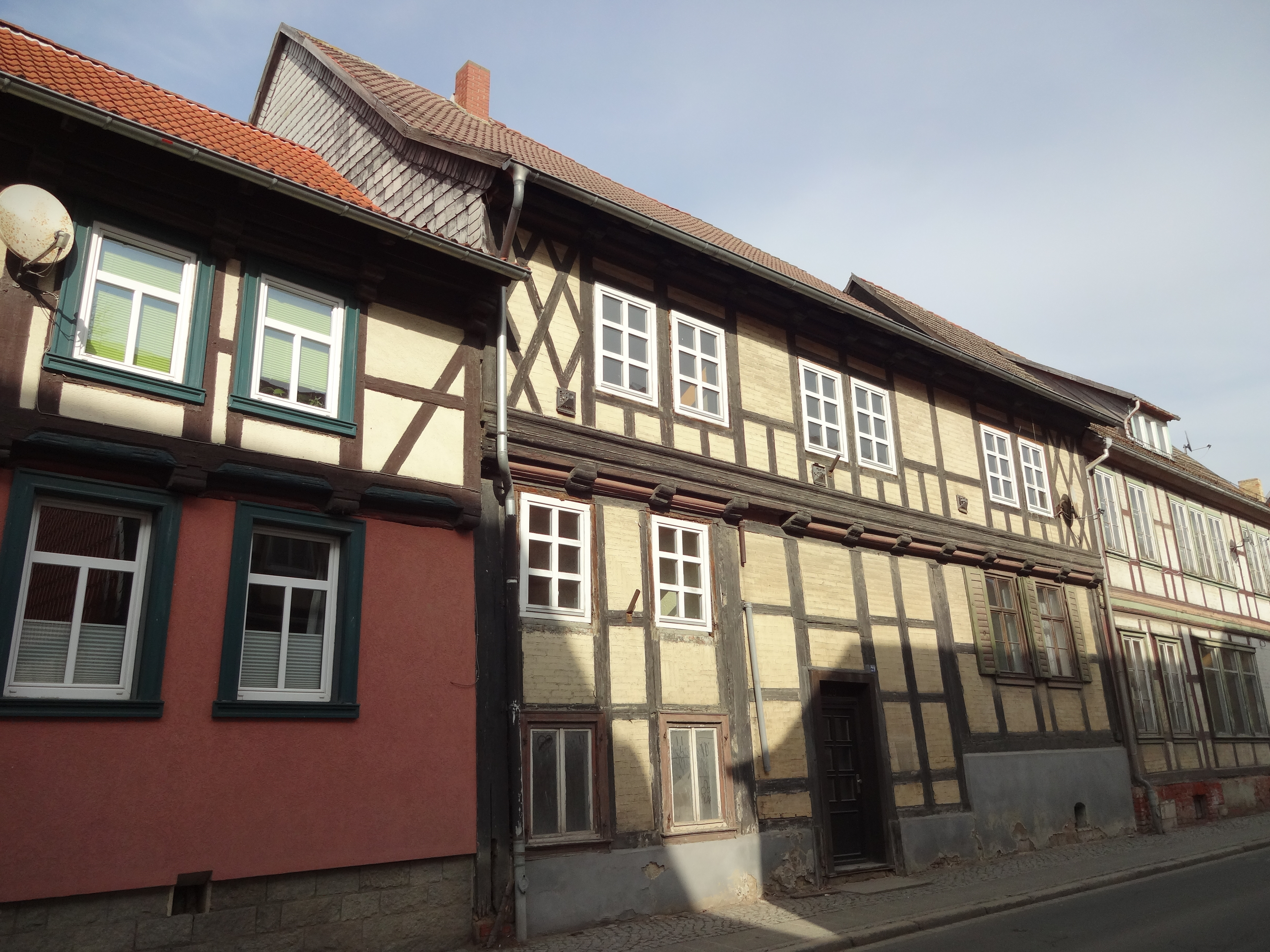 denkmalgeschütztes Fachwerkhaus in der Halberstädter Straße 29 in Derenburg, Ortsteil von Blankenburg (Harz)